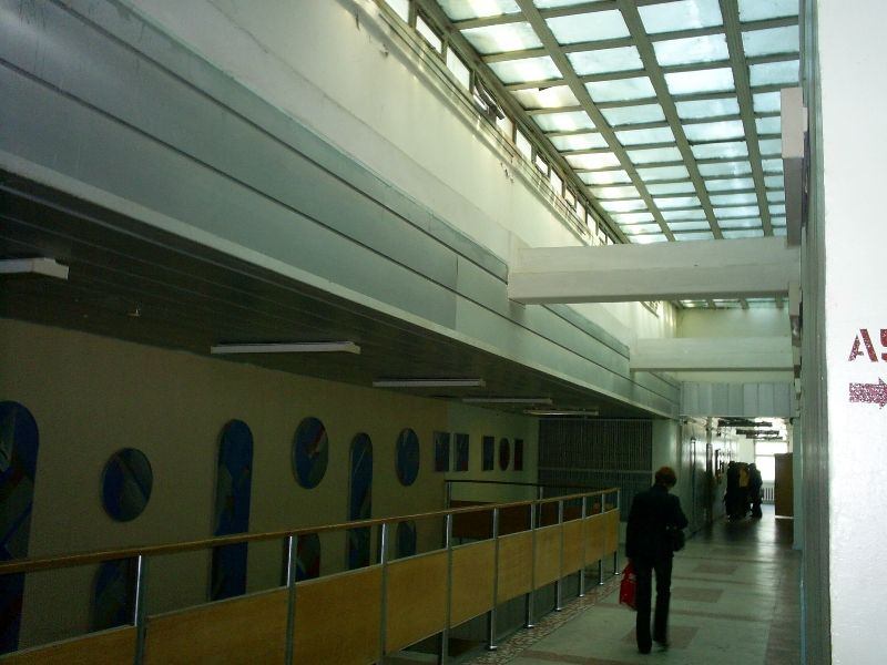 УлГУ — 4 этажУльяновкий государственный университет. Коридор на 4 этаже в главном здании